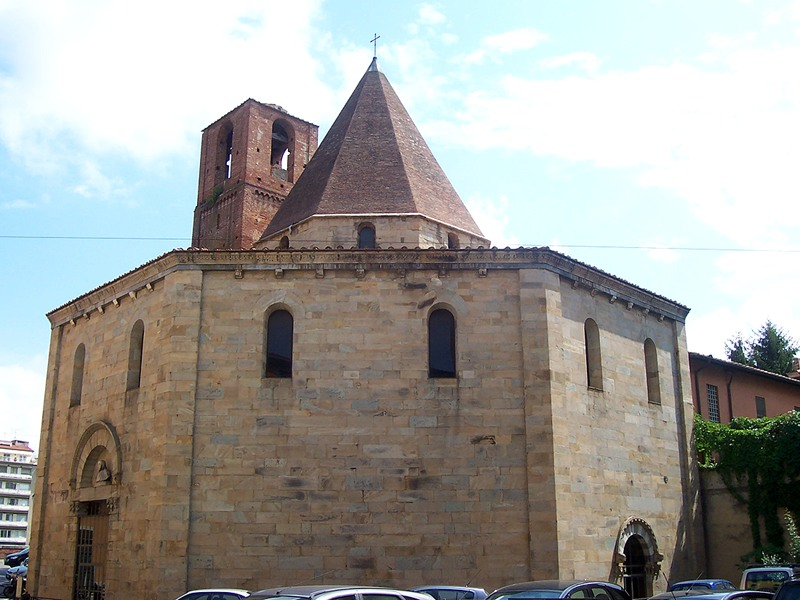 Pisa - Chiesa del S. Sepolcro